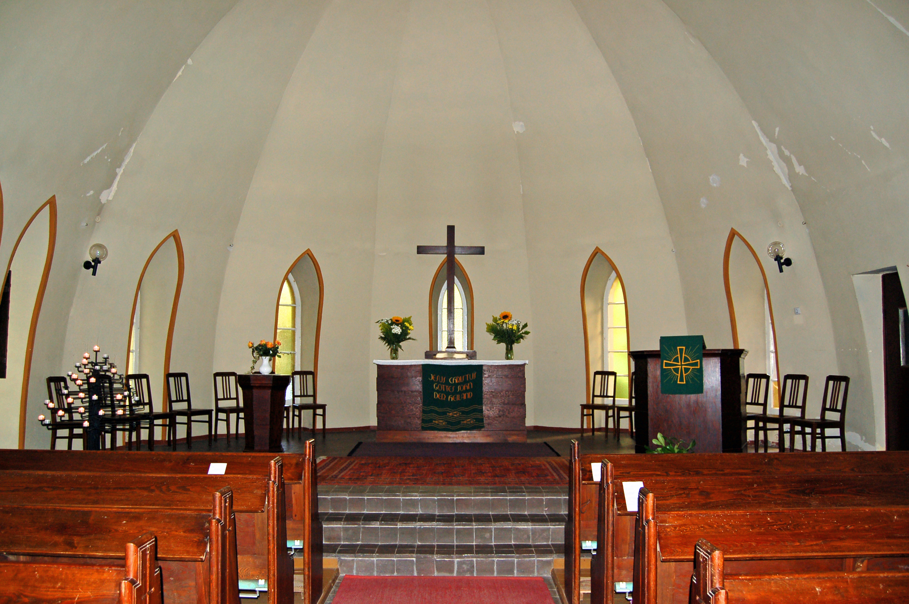 Die evangelische Dorfkirche wurde 1929 erbaut. Grundsteinlegung war am 11. Juli 1929. Richtfest wurde am 20. September 1929 gefeiert. Einweihung war am 30. Juni 1930. Der Entwurf der Kirche stammt vom Berliner Architekten Erhard Schmidt. Im Glockenturm befinden sich drei Glocken mit verschiedenen Inschriften. Das Gewölbe und die Fenster erinnern an kieloben liegende Boote. Die Kirchengemeinde Baabe gehört zum Stralsunder Kirchenkreis der Pommerschen Ev. Kirche.